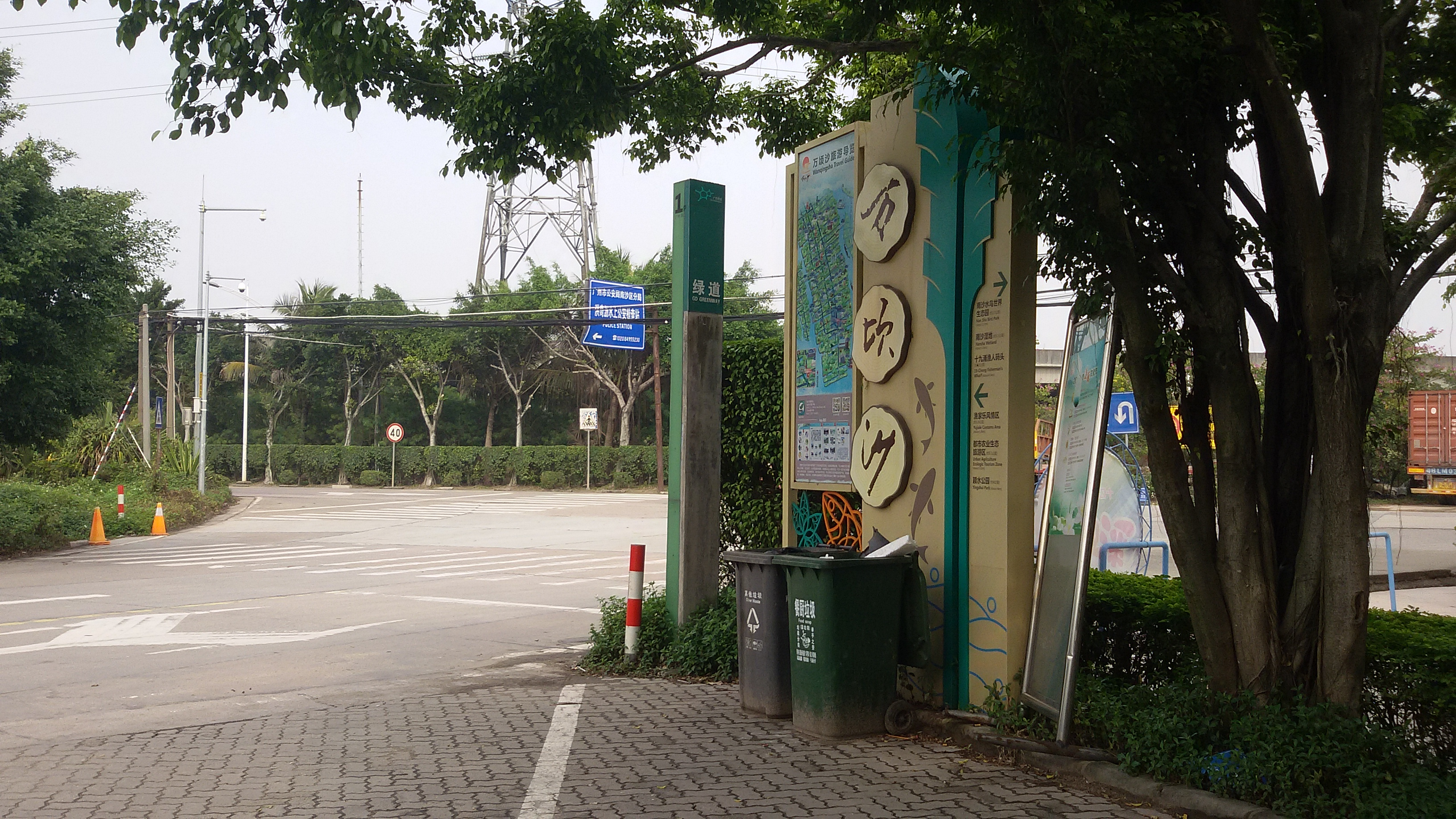 粵語: 廣州南沙區萬頃沙